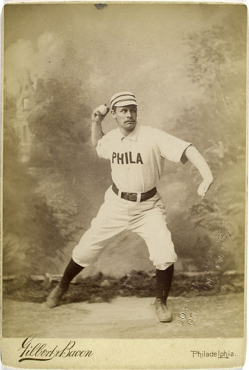 Ben Sanders, Philadelphia Quakers